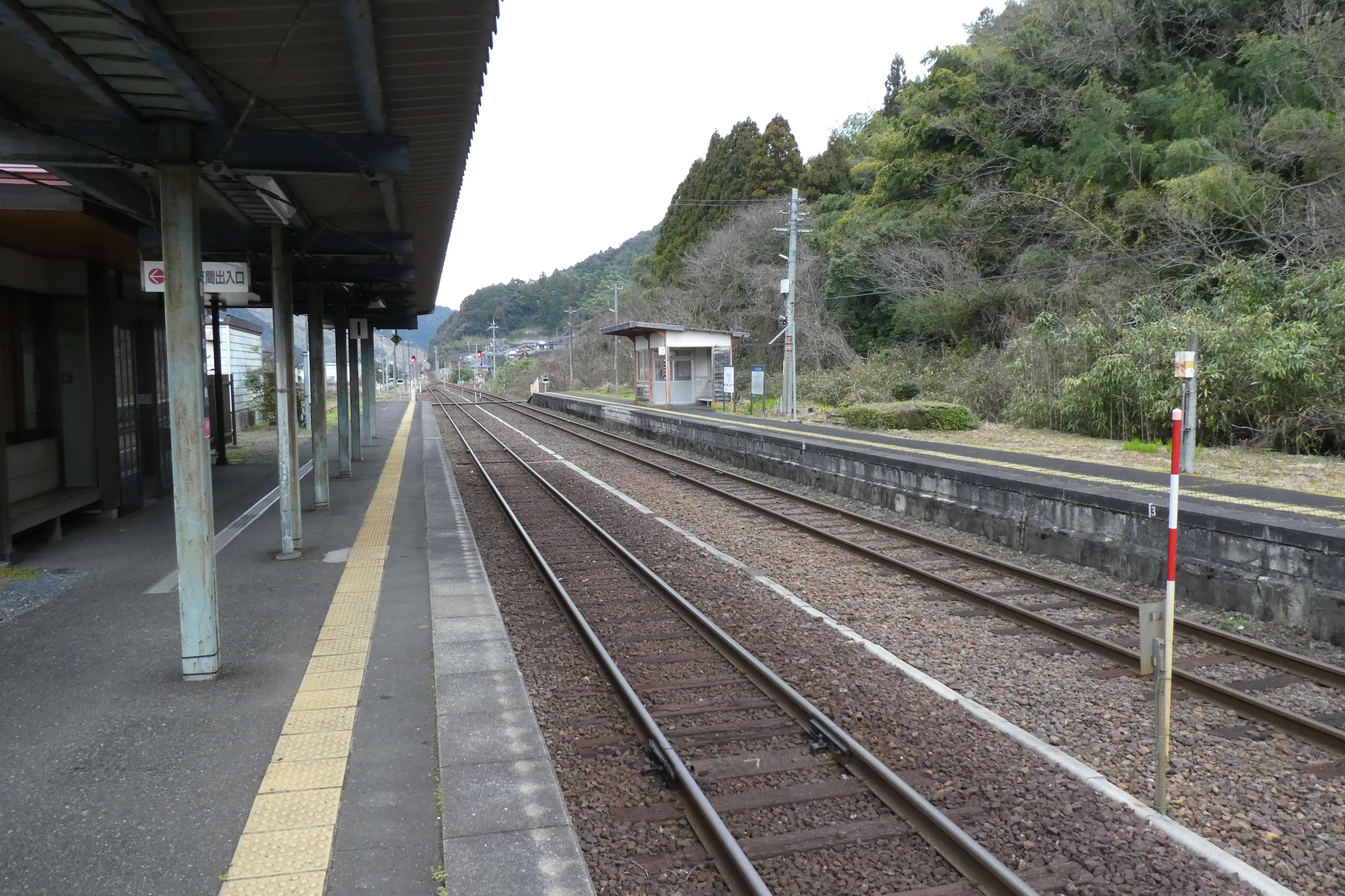 京都丹後鉄道 東雲駅 プラットホーム